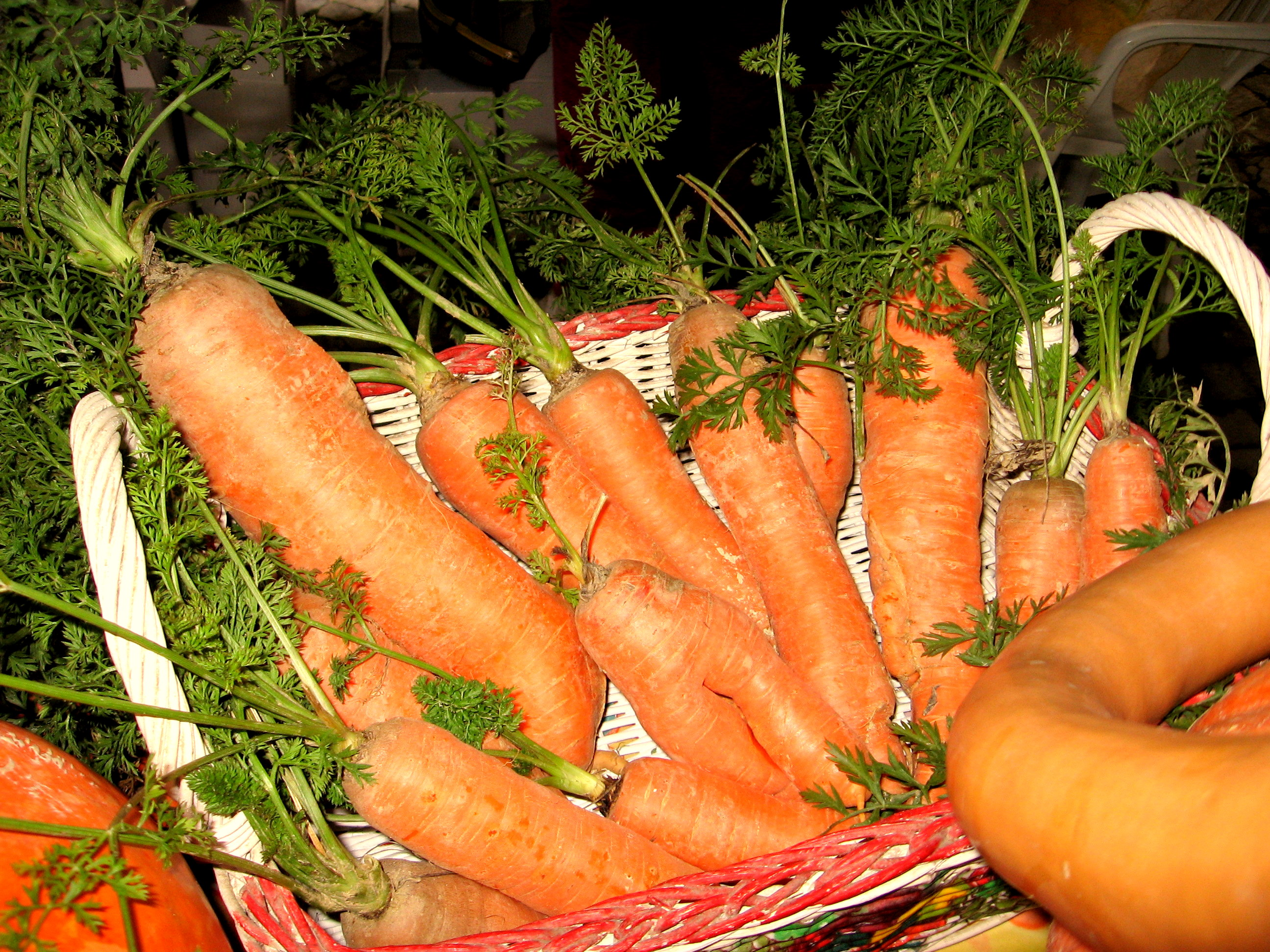 Carote Pellerino a Cortemilia.